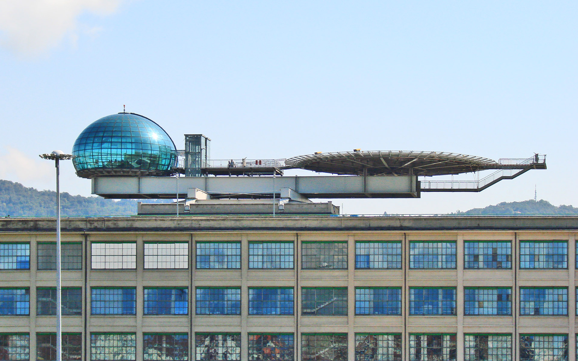 Le globe a été construit en 1994, c'est une salle de réunion à 40 m au-dessus du sol, reliée au centre des congrès par deux ascenseurs. Les usines Fiat à Turin (le Lingotto) ont été construites dans les années 1910-1920 par l'architecte Giacomo Matté-Trucco (1869-1934), elles comprenaient une célèbre piste d'essai sur le toit de plus d'un kilomètre de long. Deux rampes au sud et au nord de l'usine permettaient aux voitures d'accéder à la piste. La transformation de l'ensemble des bâtiments en centre commercial, bureaux, hôtels et centre des congrès a été confiée à l'architecte Renzo Piano. Il a également construit un héliport et un bâtiment (l'Ecrin) destiné à accueillir la pinacothèque de la famille Agnelli.